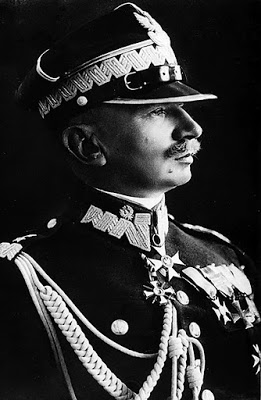 Generał Juliusz Rómmel - 1920s